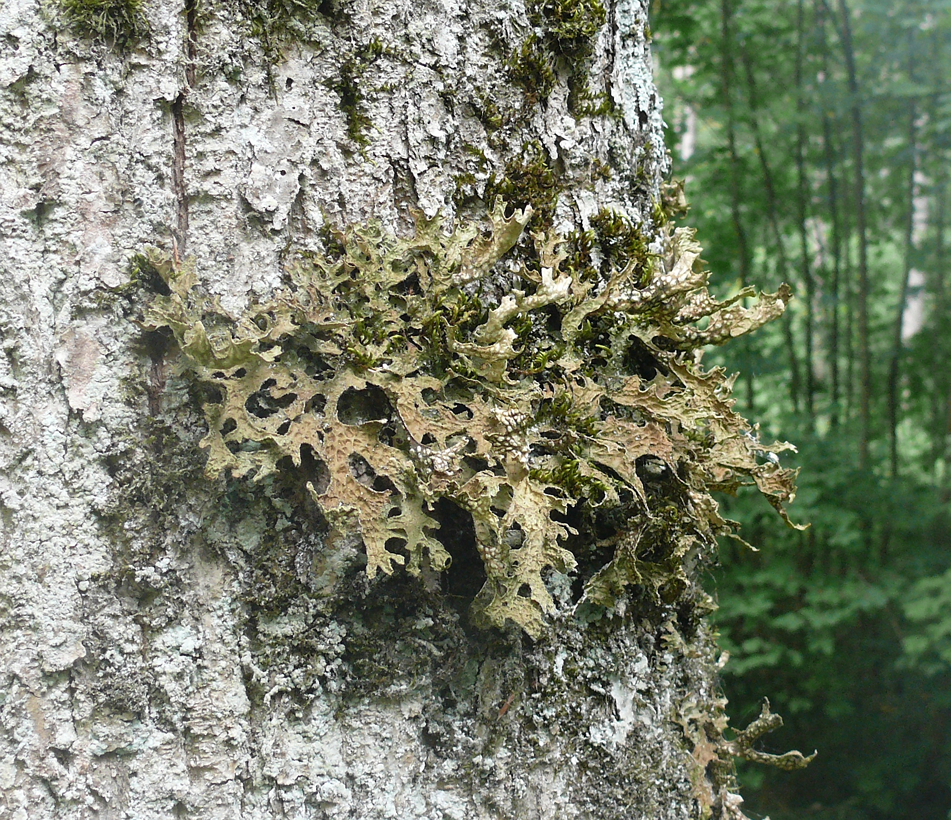 Lobaria pulmonaria, Schwäbisch-Fränkische Waldberge, Deutschland